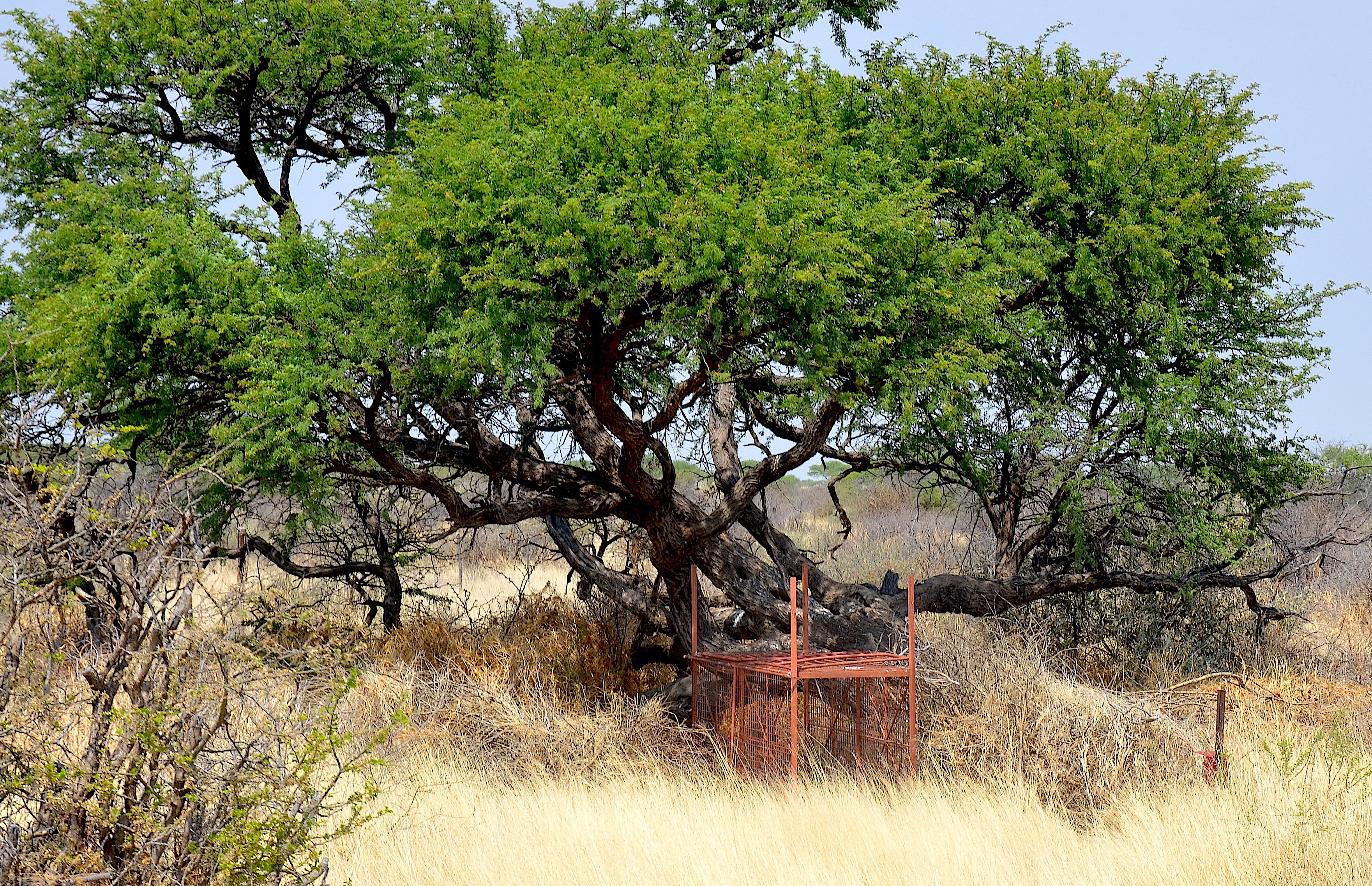 Raubtier-Falle auf Farm Eskadron in Namibia